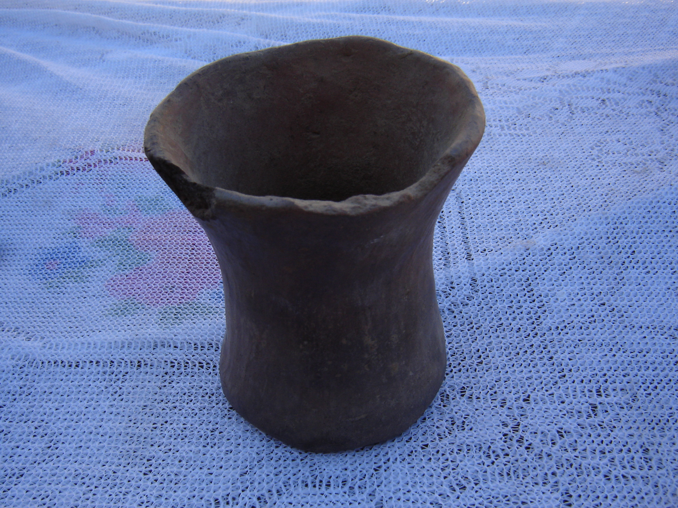 Qiru, un vaso sagrado. Pieza arqueológica de alguno de los pueblos y culturas antiguas que habitaron en la población de Vacas, encontrado durante las nuevas construcciones. Pertenece a una colección particular. Runa Simi: Juq wak'a qiru, ñawpa runakuna Wak'aspi tiyakuqkunaqta tarisqa musuq wasi ruwaykunapi.